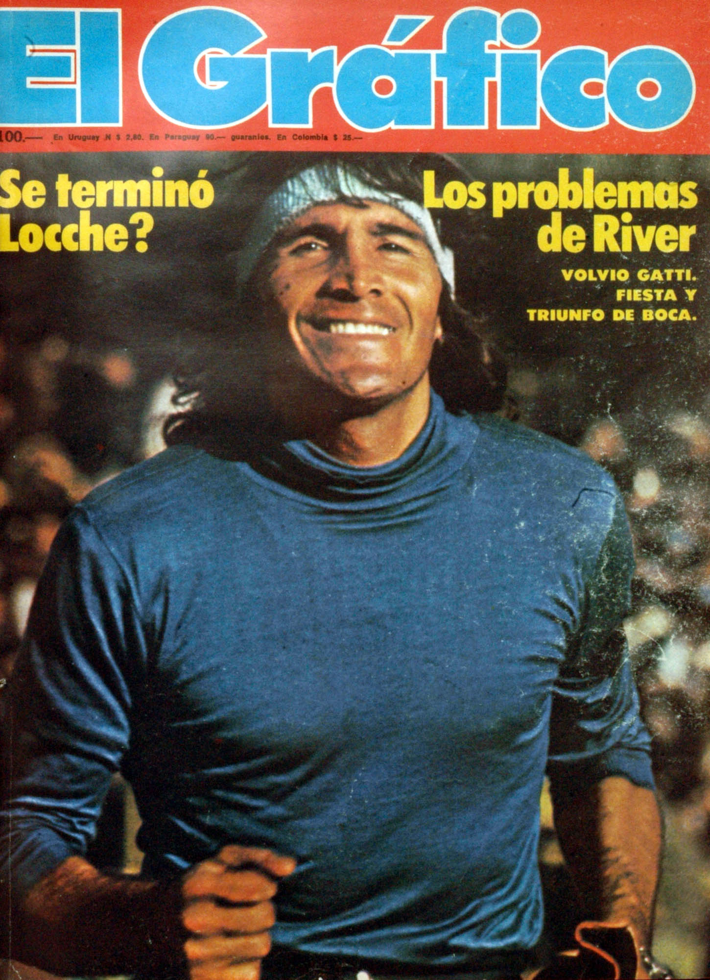 El Grafico del 12 de Mayo de 1976. Edicion 2953